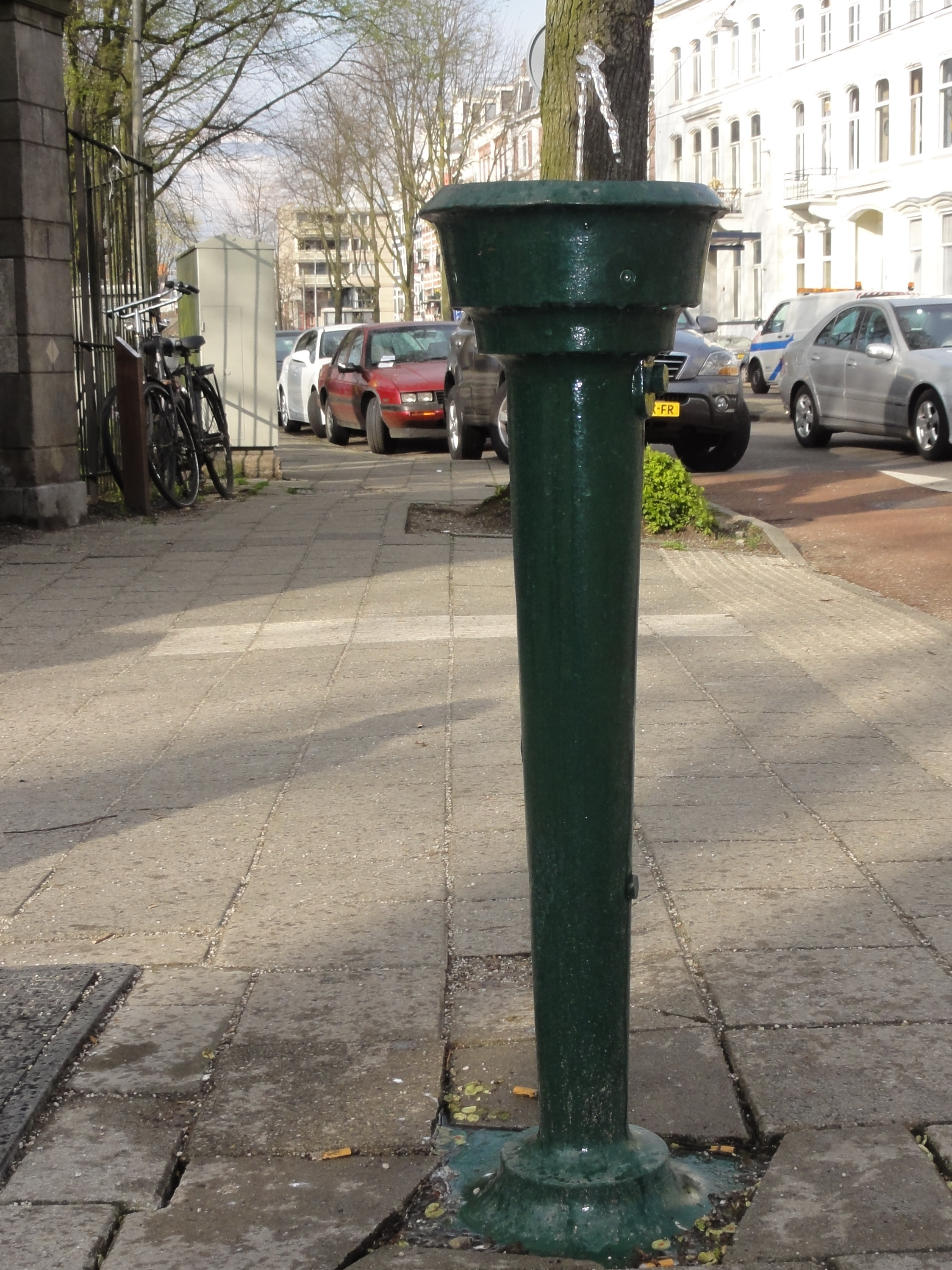 Waterhappertje voor de ingang van het Wertheimpark op de hoek van de Plantage Middenlaan en de Plantage Parklaan in Amsterdam.